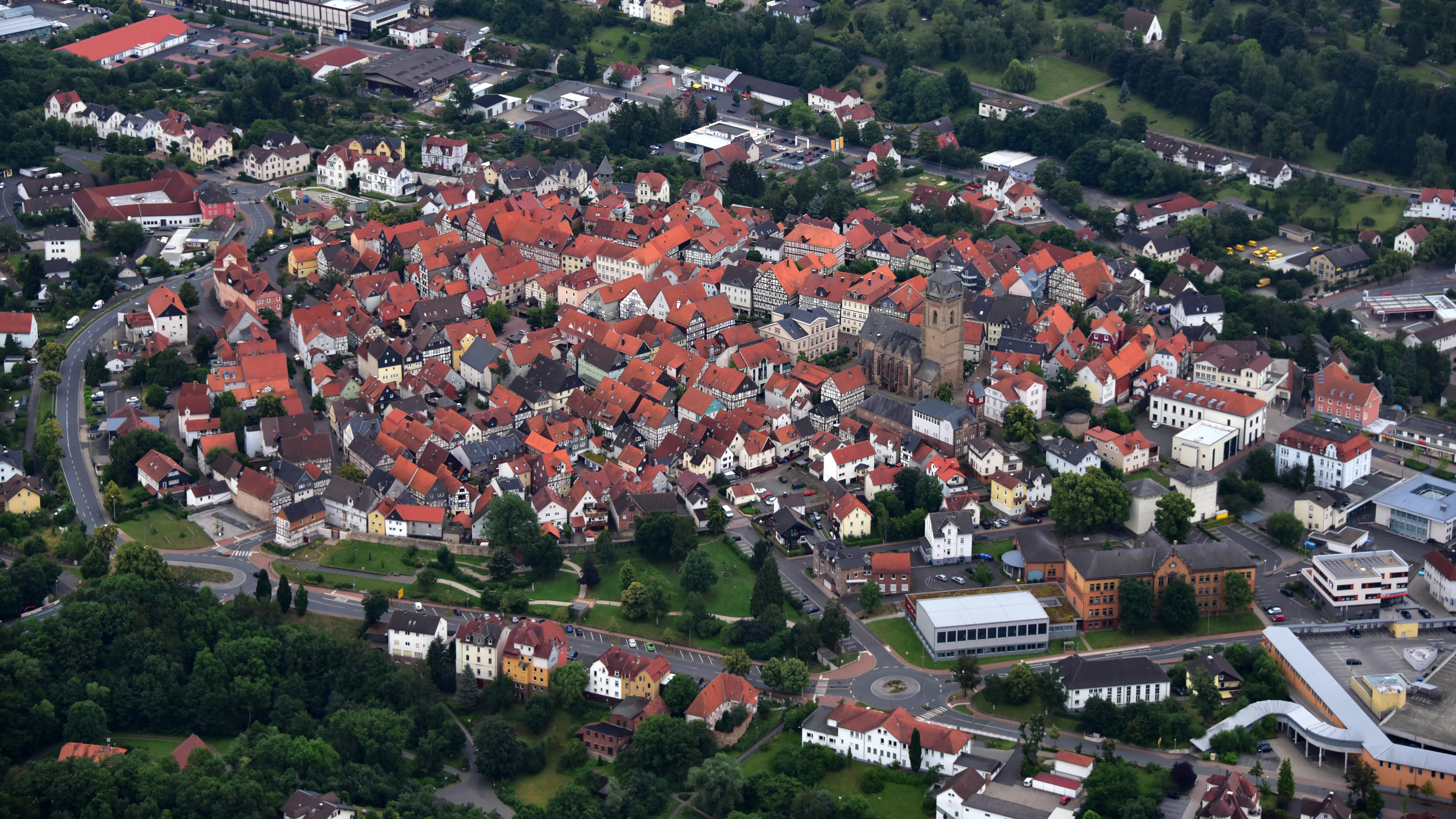 Die Altstadt von Bad Wildungen, Luftaufnahme (2016)